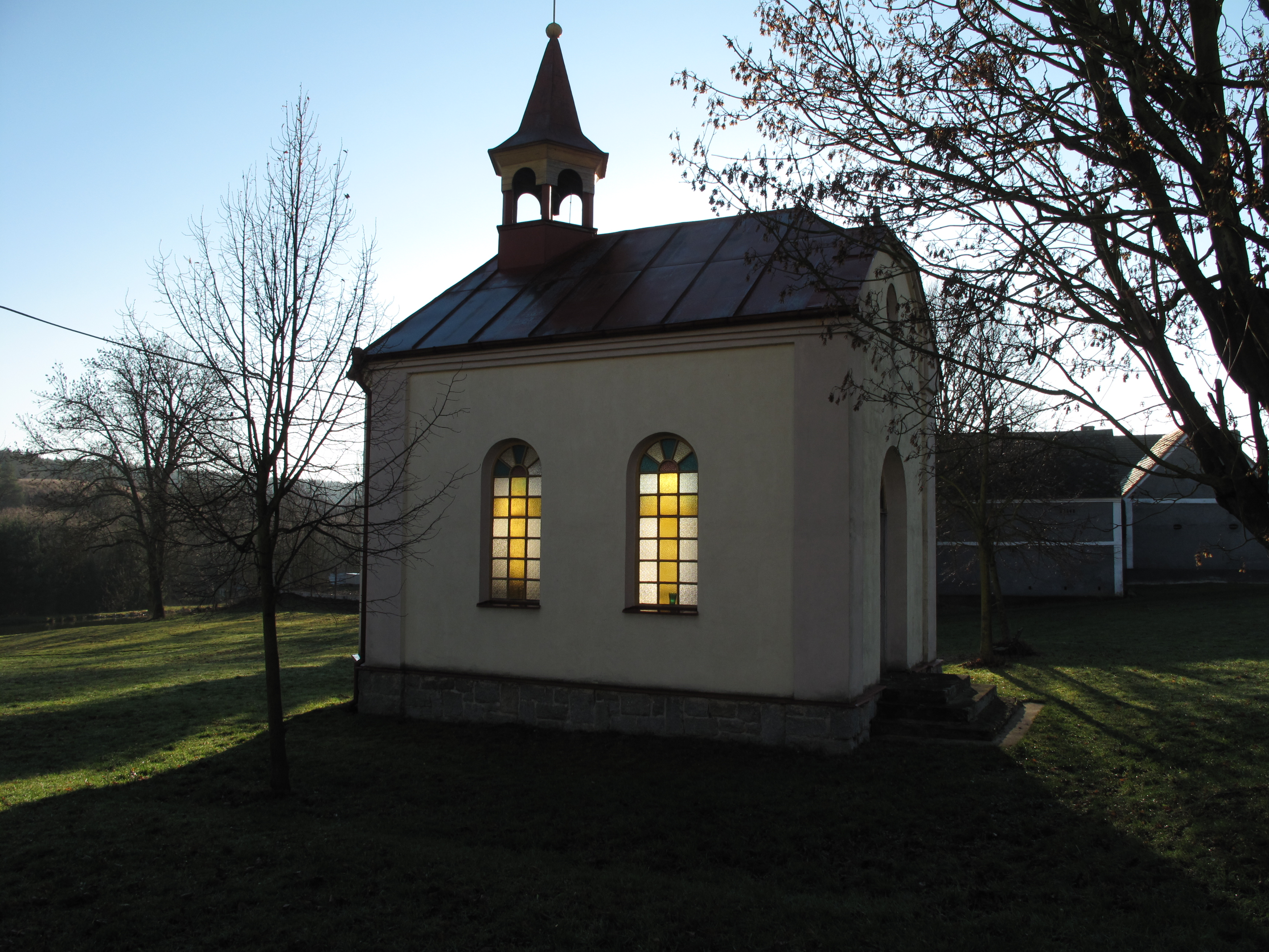 Kaplička v Lelově. Okres Plzeň-jih, Česká republika.